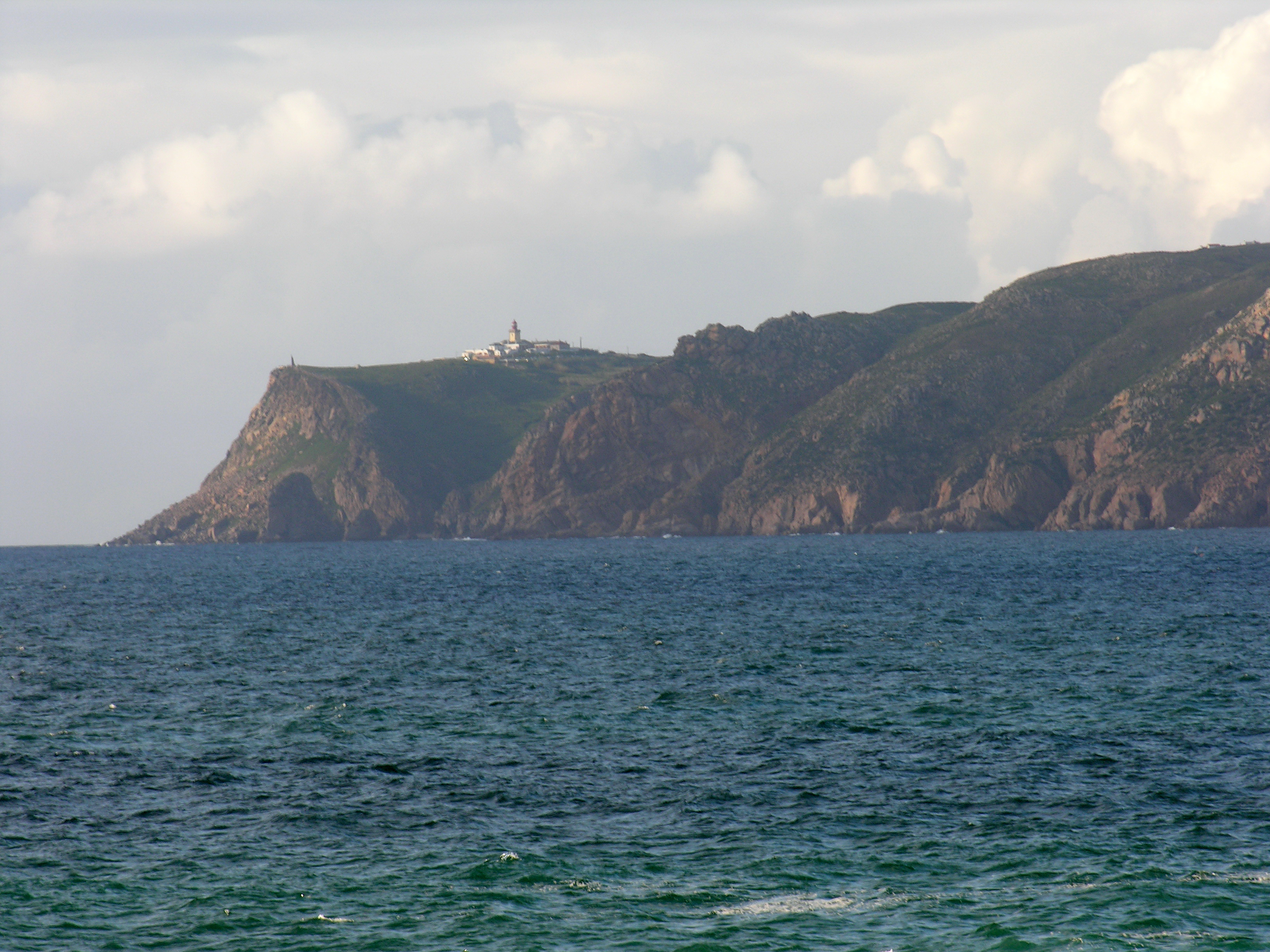 Cabo da Roca desde Guincho, entre Cascais e Sintra (Portugal) Publish by= Luis Miguel Bugallo Sánchez. Self made